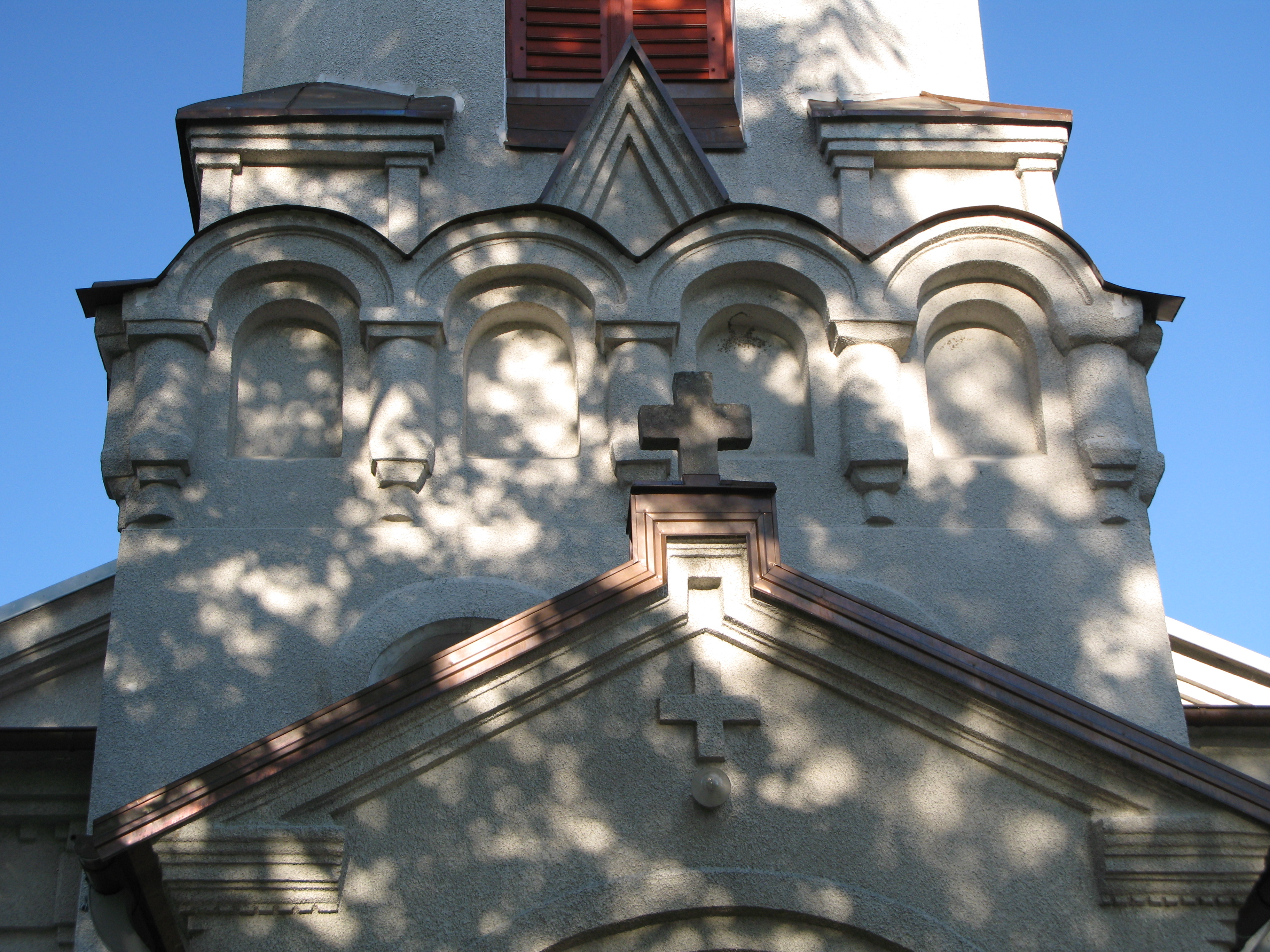 Cerkiew greko-kat., ob. prawosławna par. p.w. Narodzenia Matki Boskiej Przeczystej, mur., 1821-1823, 1907-1910 Mielnik, Mielnik